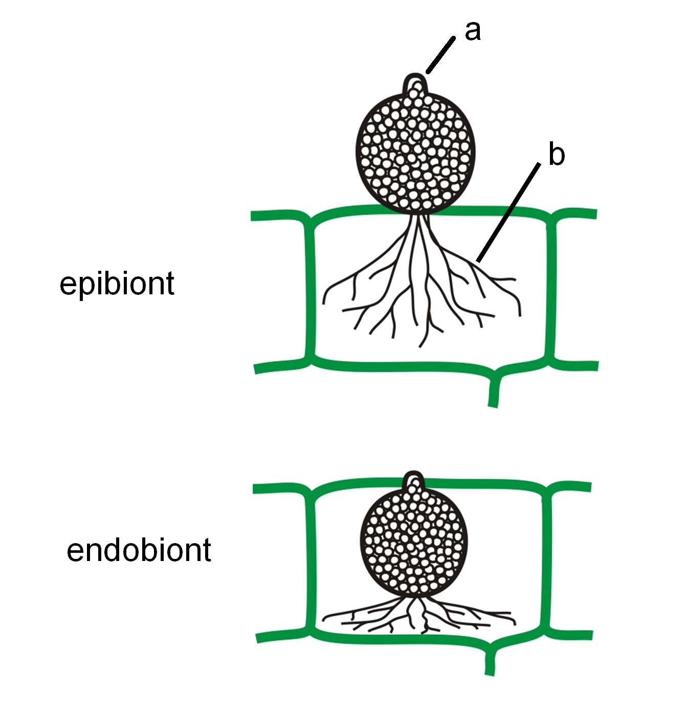 Diagram: epibiont and endobiont